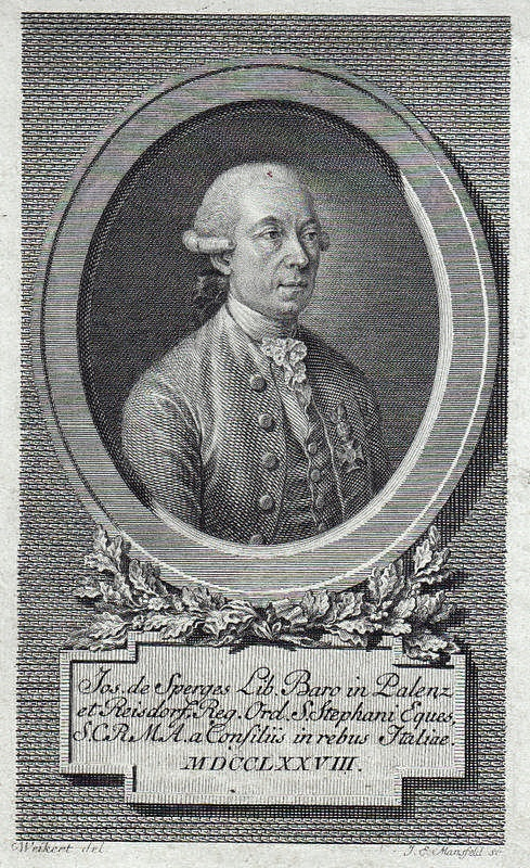 Joseph von Sperges (1725-1791) österreichischer Diplomat und Gelehrter